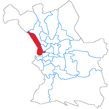 Situation du canton dans la ville de Marseille